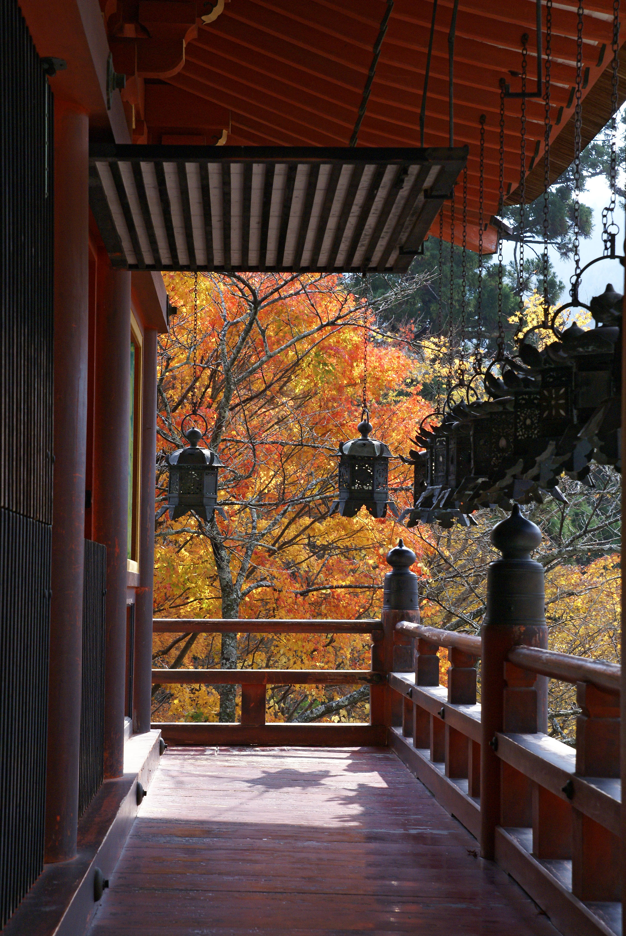 Tanzan-jinja in Sakurai, Nara, Japan